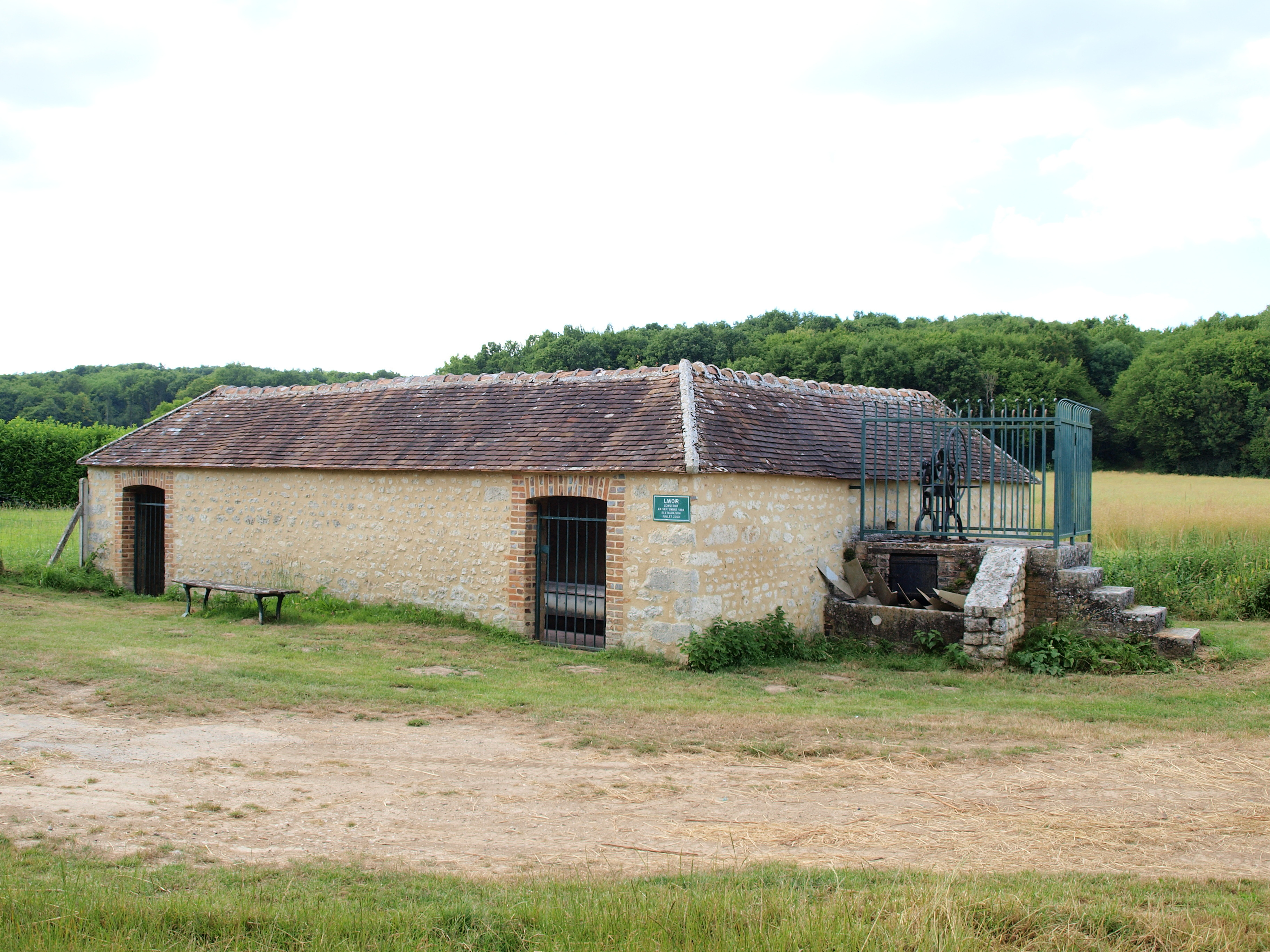 Lavoir de Vaux-sur-Lunain (Seine-et-Marne, France)